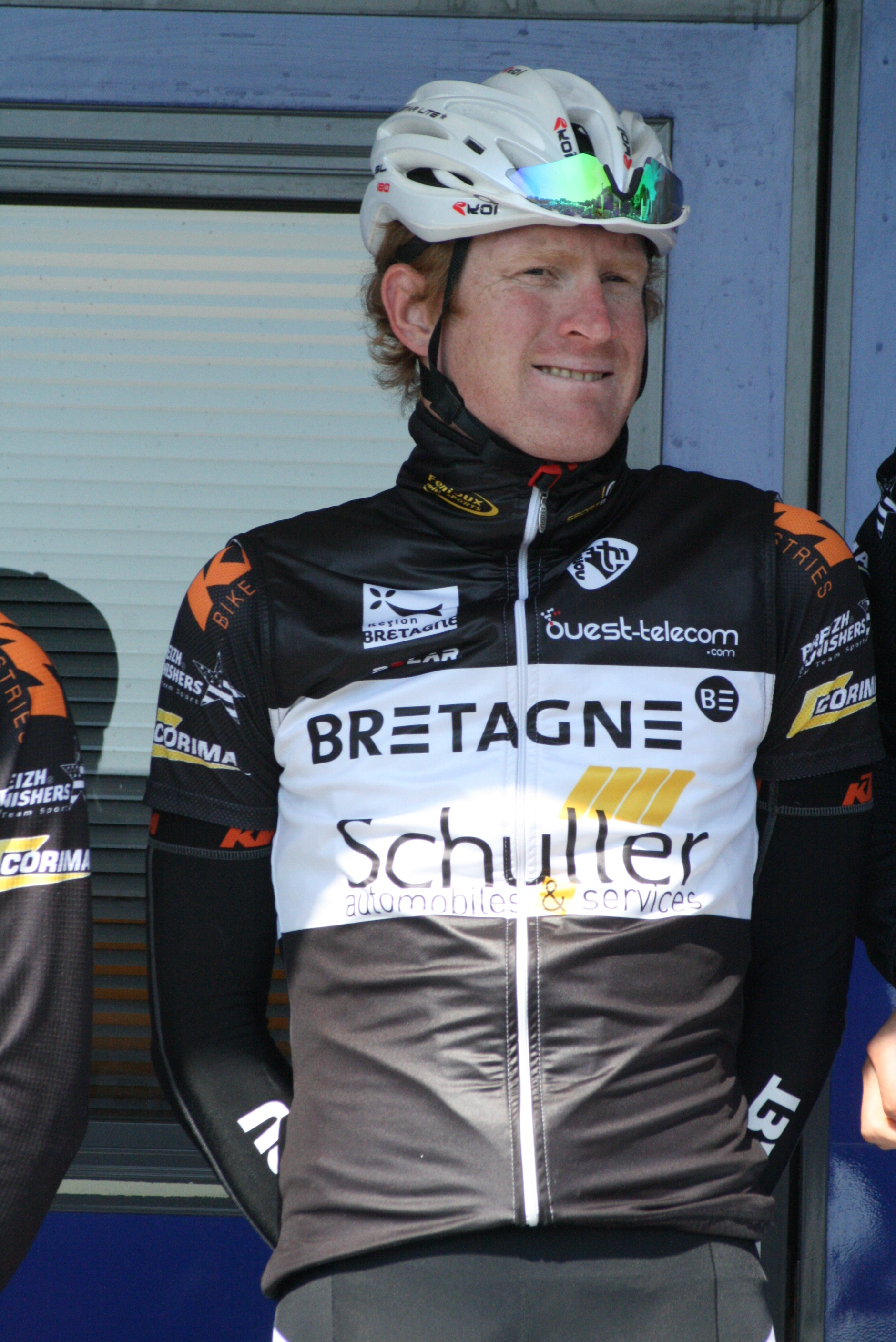 Présentation des coureurs au départ de la première étape Eric Berthou